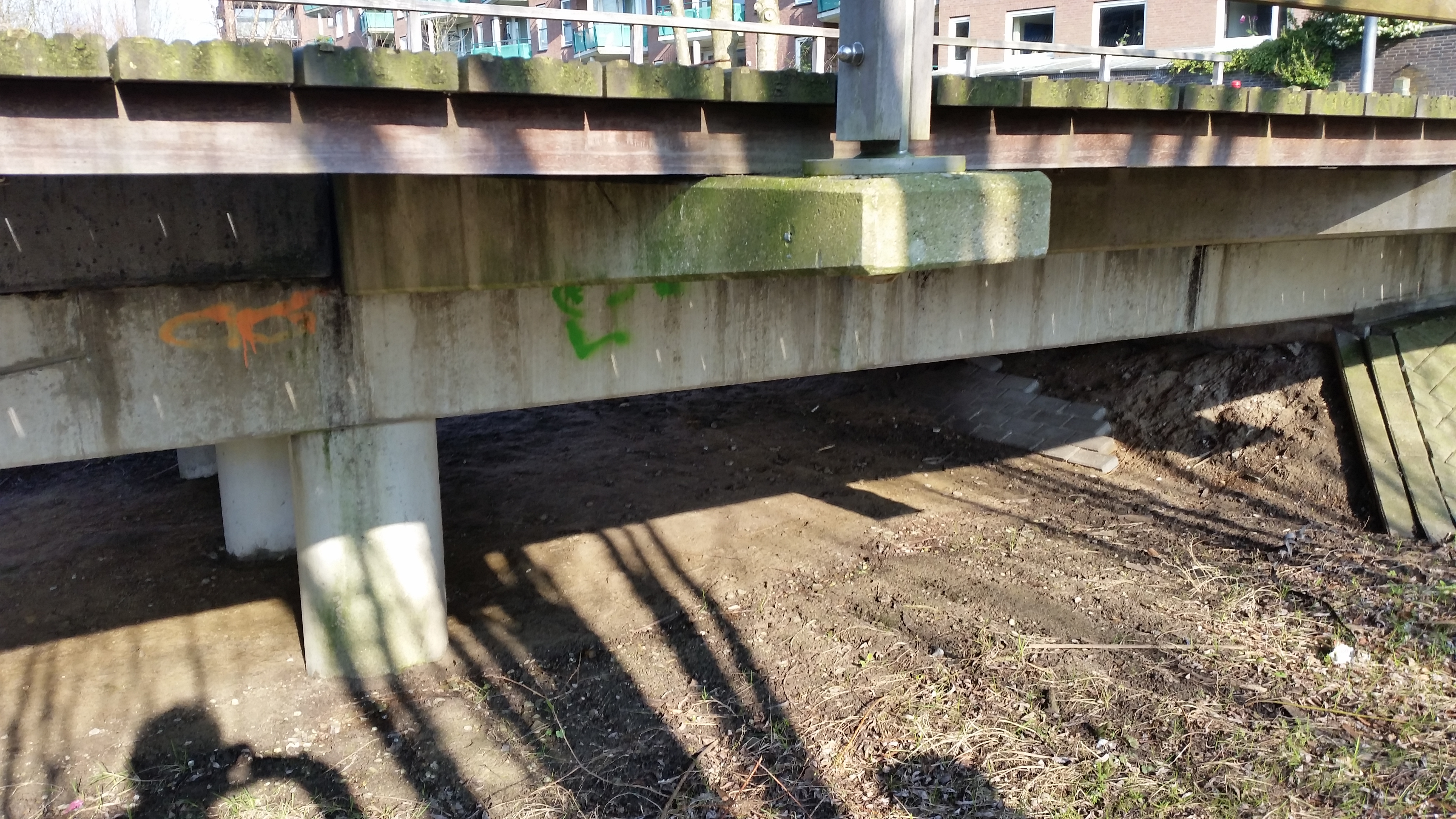 Impressie van de Wim Suurbierbrug in Amsterdam-Watergraafsmeer (maart 2020)